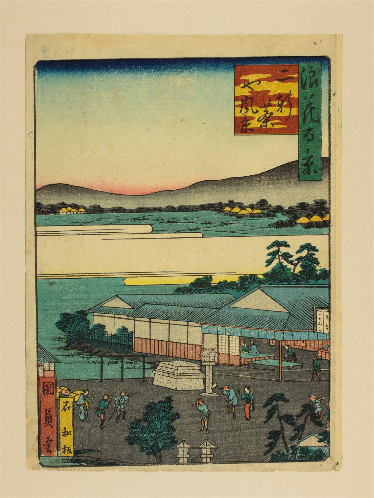 1800年代。歌川國員/画。浪花百景 102枚のうちの1枚。大阪市立中央図書館蔵。